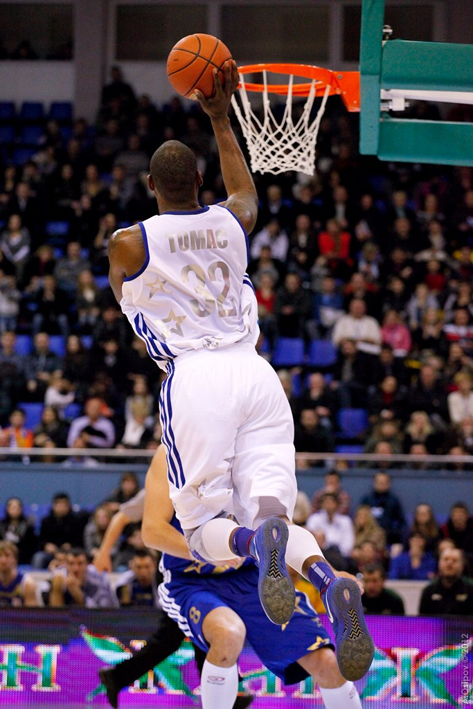 Матч всех звезд баскетбольной Суперлиги 2012. Киев. Ukrainian All-star